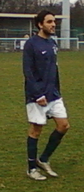 Jawad El-Hajri lors du match Paris FC B-Saint-Omer du 20 février 2011